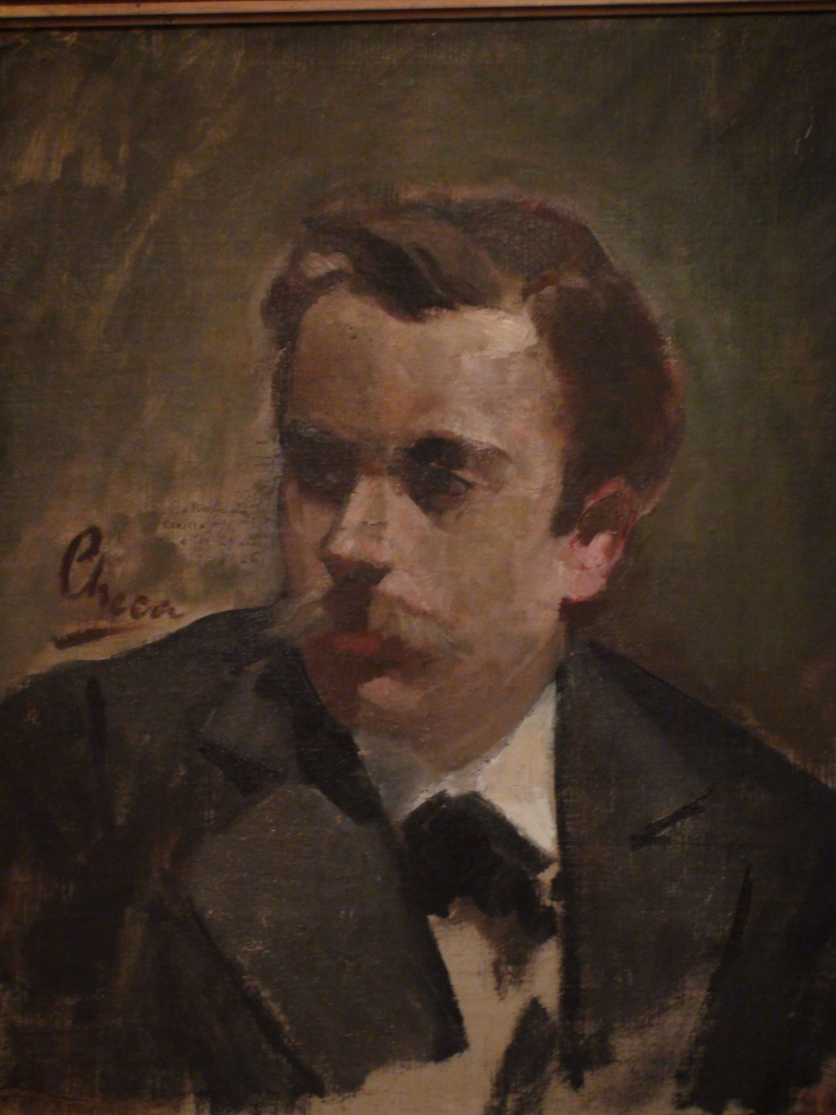 Retrato de Cecilio Plá, 1885. Oleo sobre lienzo 47 X 40 cm.